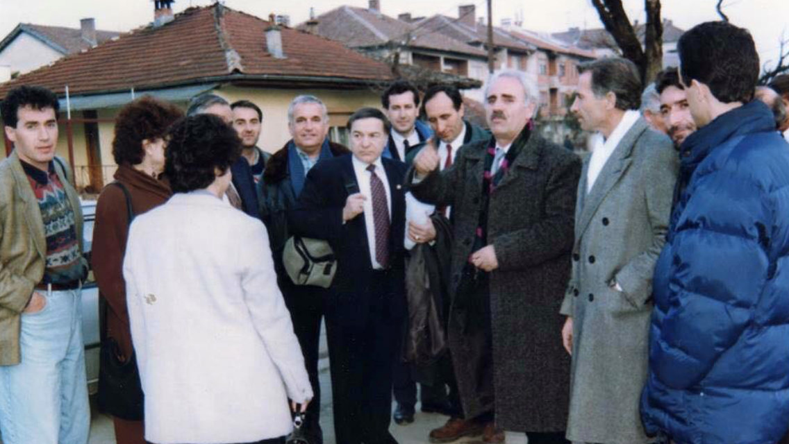 Nevzat Halili dhe kongresmeni Joseph DioGuardi